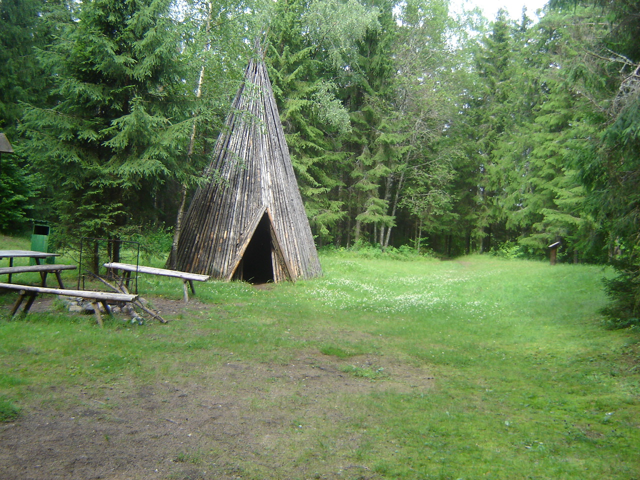 Änta Punamäe kesklinnuse siseõu koos püstkojaga